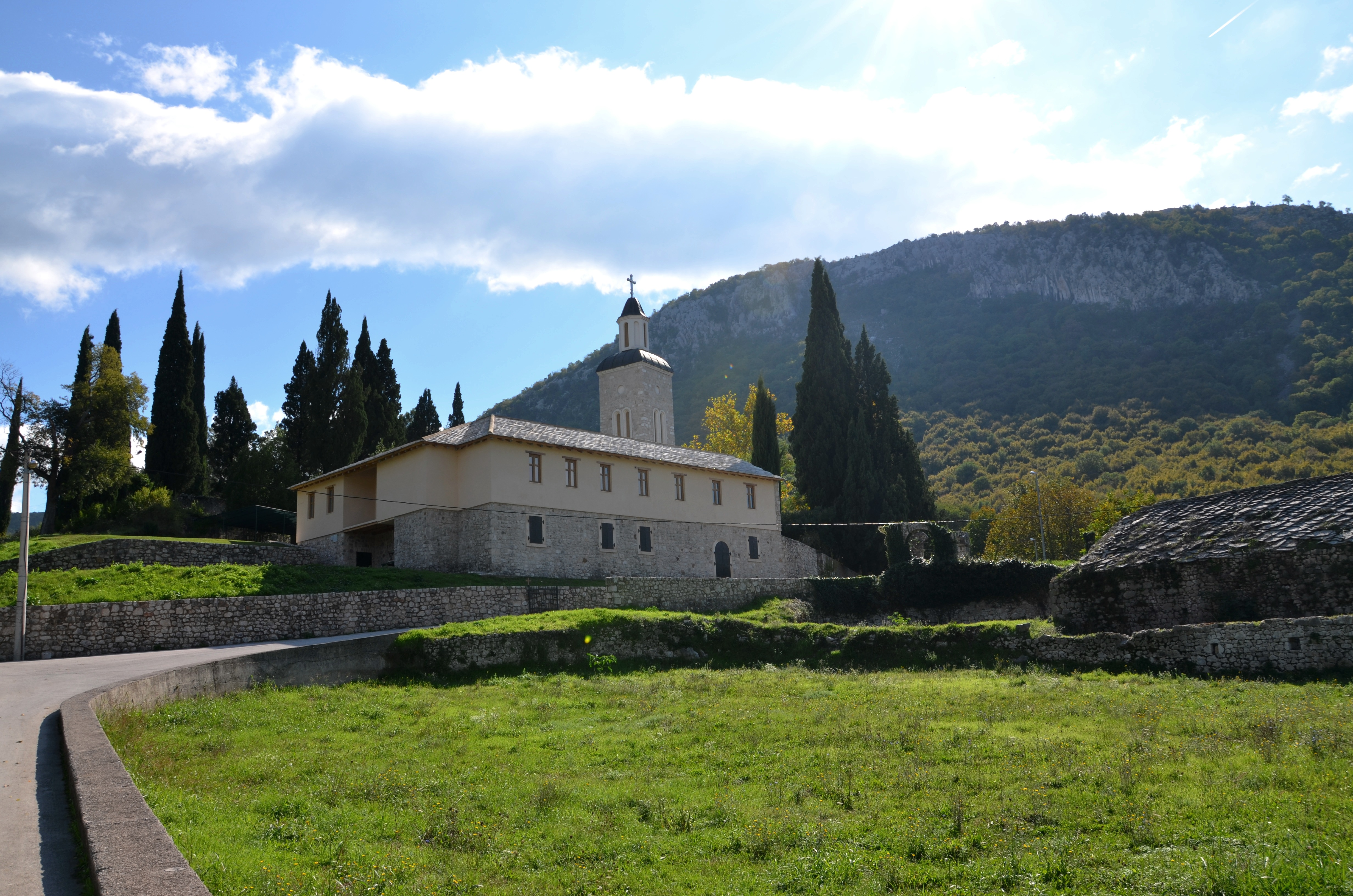 Манастир Житомислић This image was uploaded as part of Trace of Soul 2015.